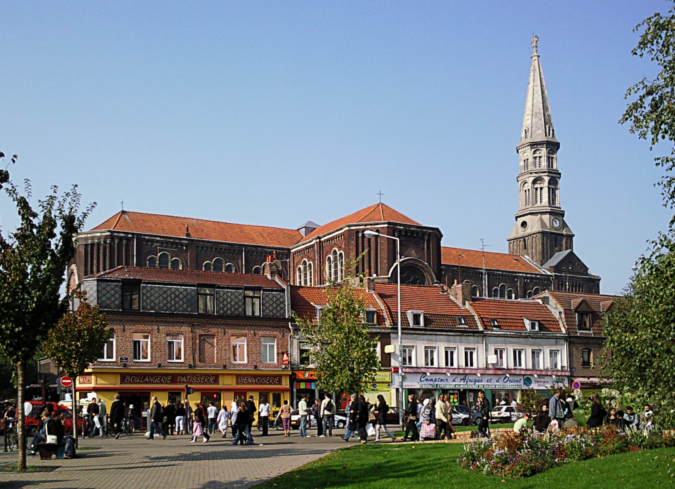 L'église Saint-Pierre Saint-Paul, de style néo-roman, dans le quartier de Wazemmes à Lille (Nord). Elle a été construite entre 1854 et 1857 par les architectes Pierre-Joseph Caloine et Gruloy.